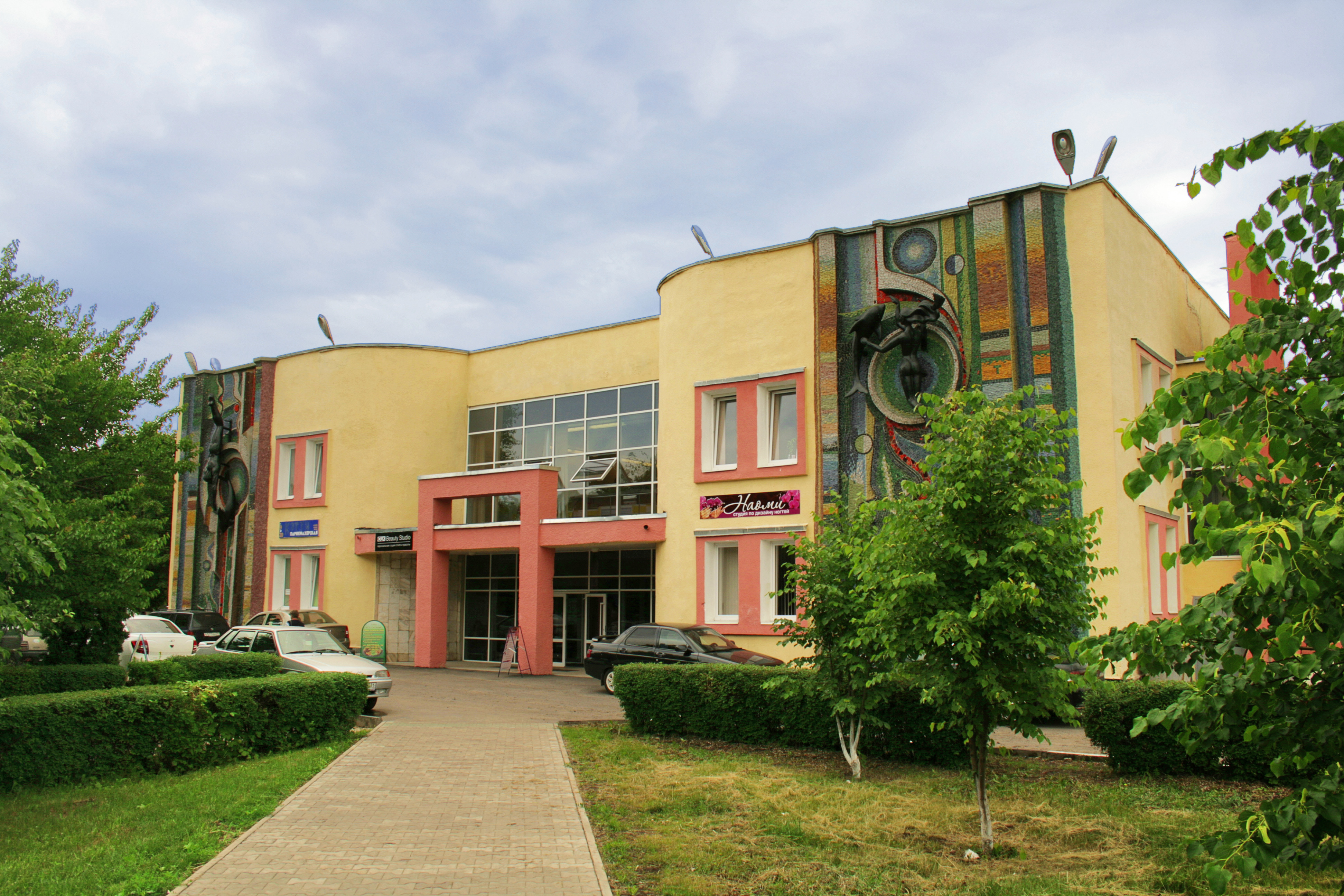 Бассейн Дельфин. Старый Оскол